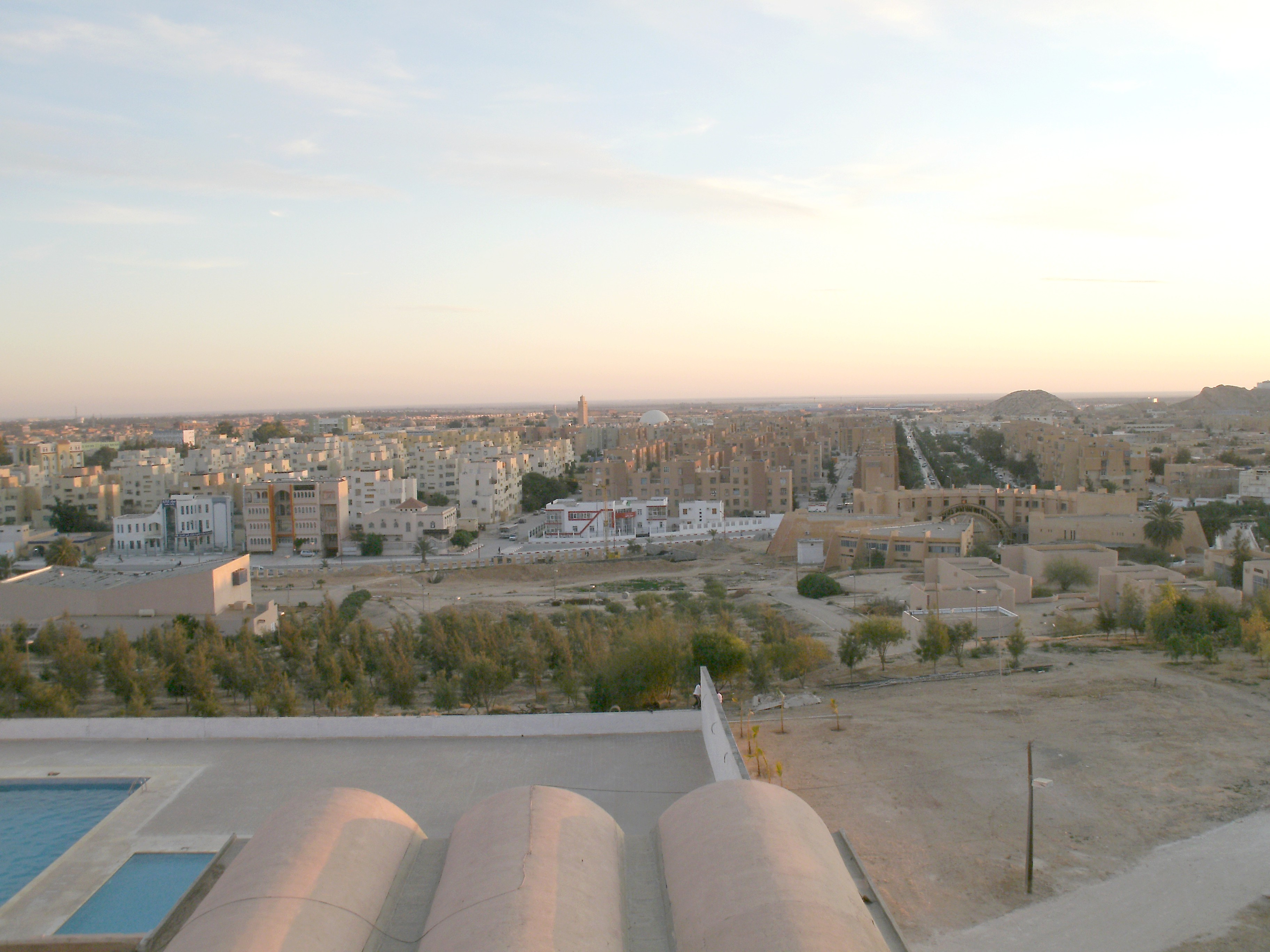 Vue générale de Biskra